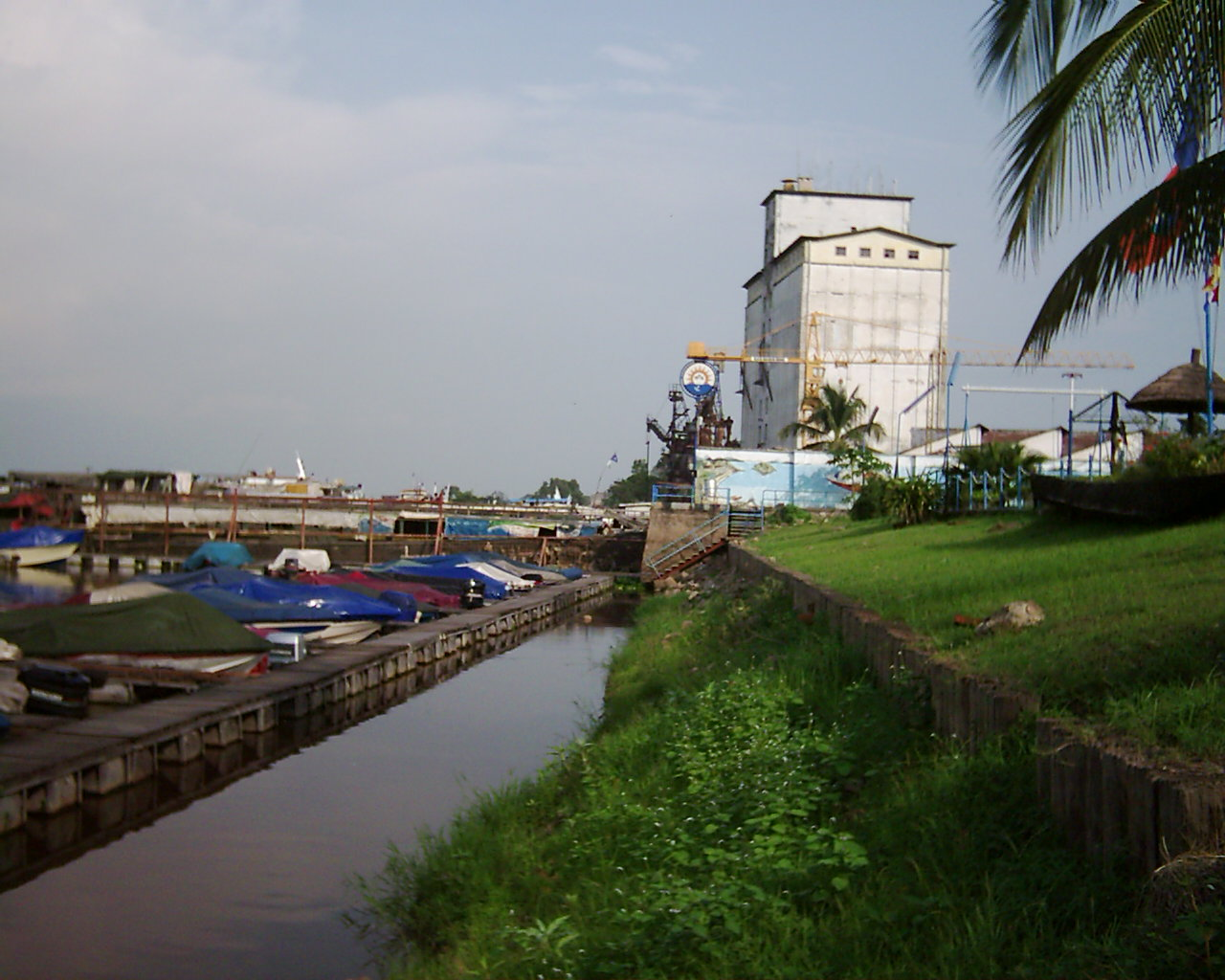 Port de Kinshasa à Limete : darse du Nautic Club de Kinshasa et silot.